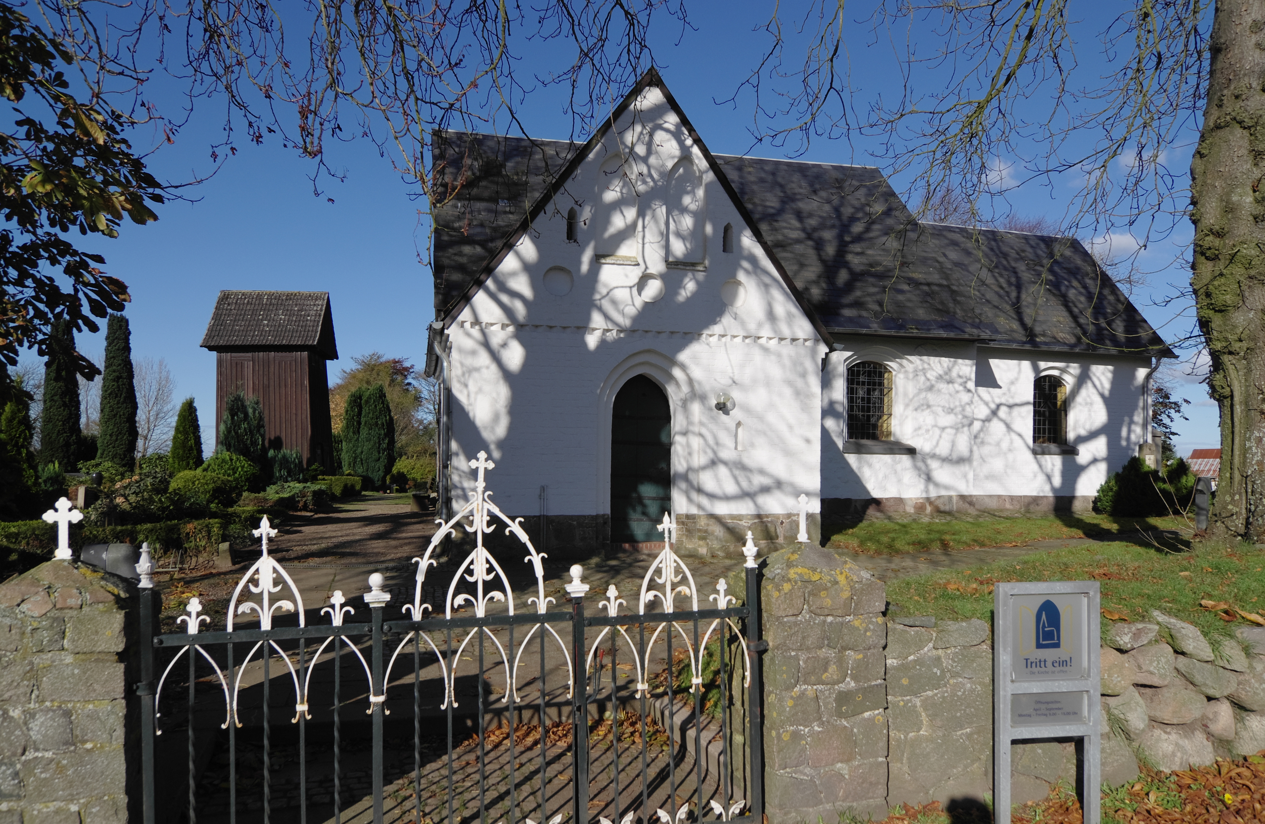 Denkmalgeschütztes Kirche in Nübel, Kreis Schleswig-Flensburg.